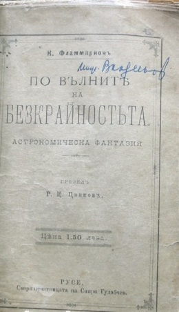 Фламмарионъ, К (1903) По вълнитѣ на безкрайностьта, Русе: Скоро-печатницата на Спиро Гулабчевъ